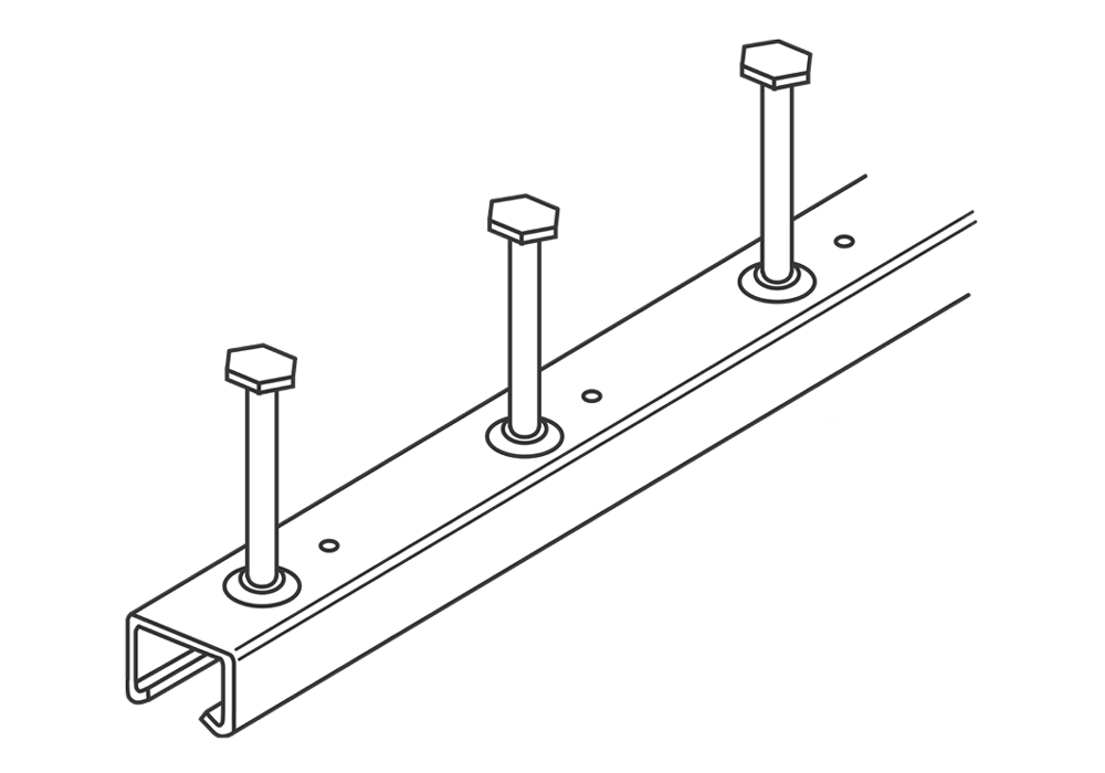 Kaltgewalzte ATC Ankerschienen Skizze von ancotech.